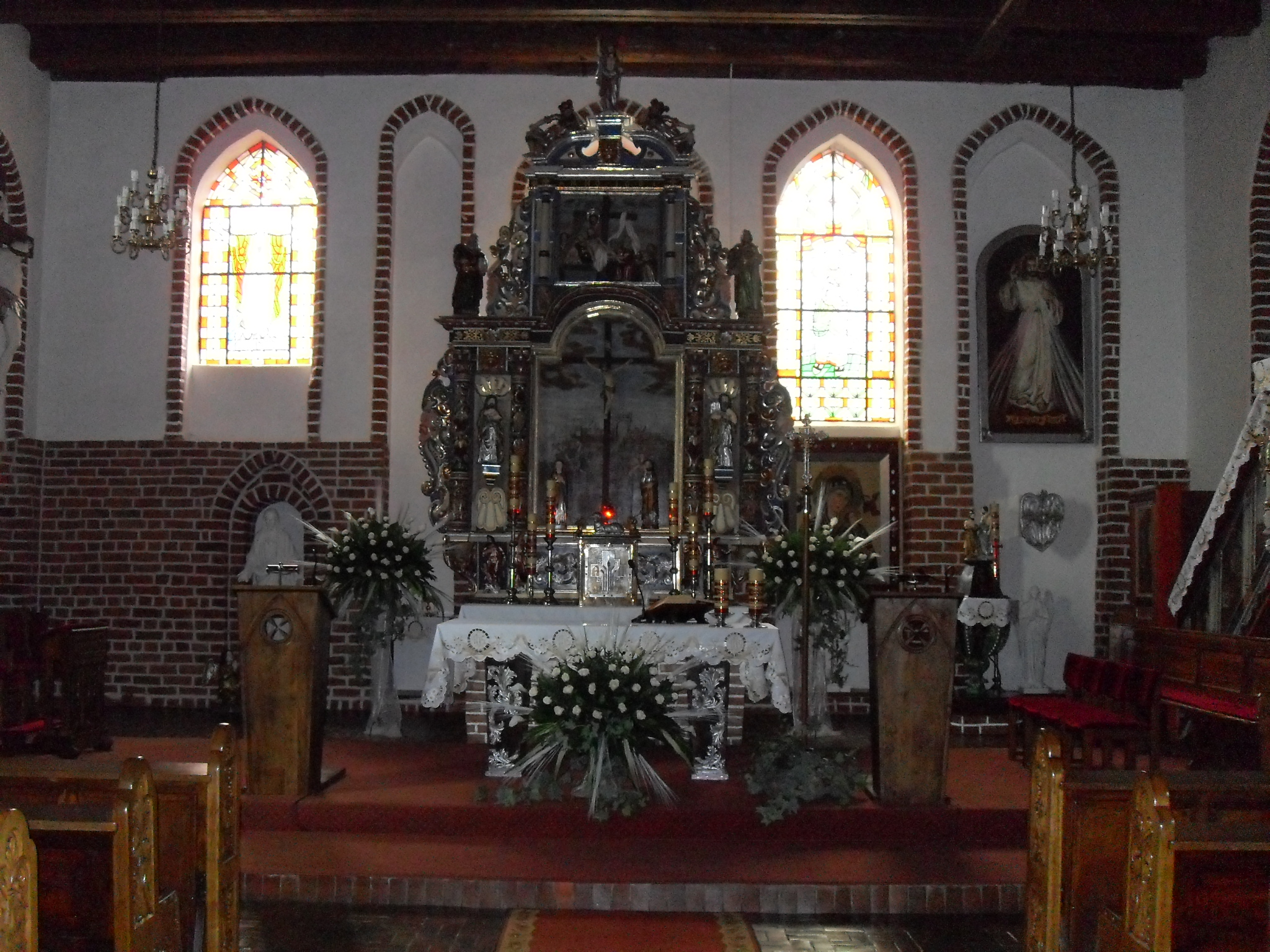 Cerkwica - rzymskokatolicki kościół parafialny p.w. Najświętszego Serca Pana Jezusa, XV (ołtarz)